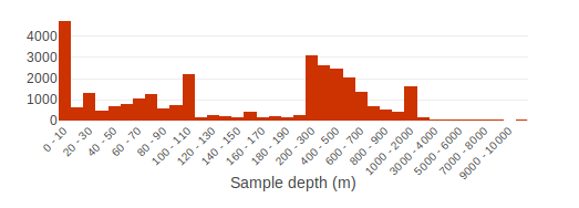 Gráfico que demonstra a distribuição de profundidade oceânica dos camarões da superfamília Sergestoidea